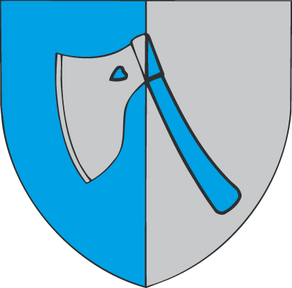 Wappen von Wiener Neudorf